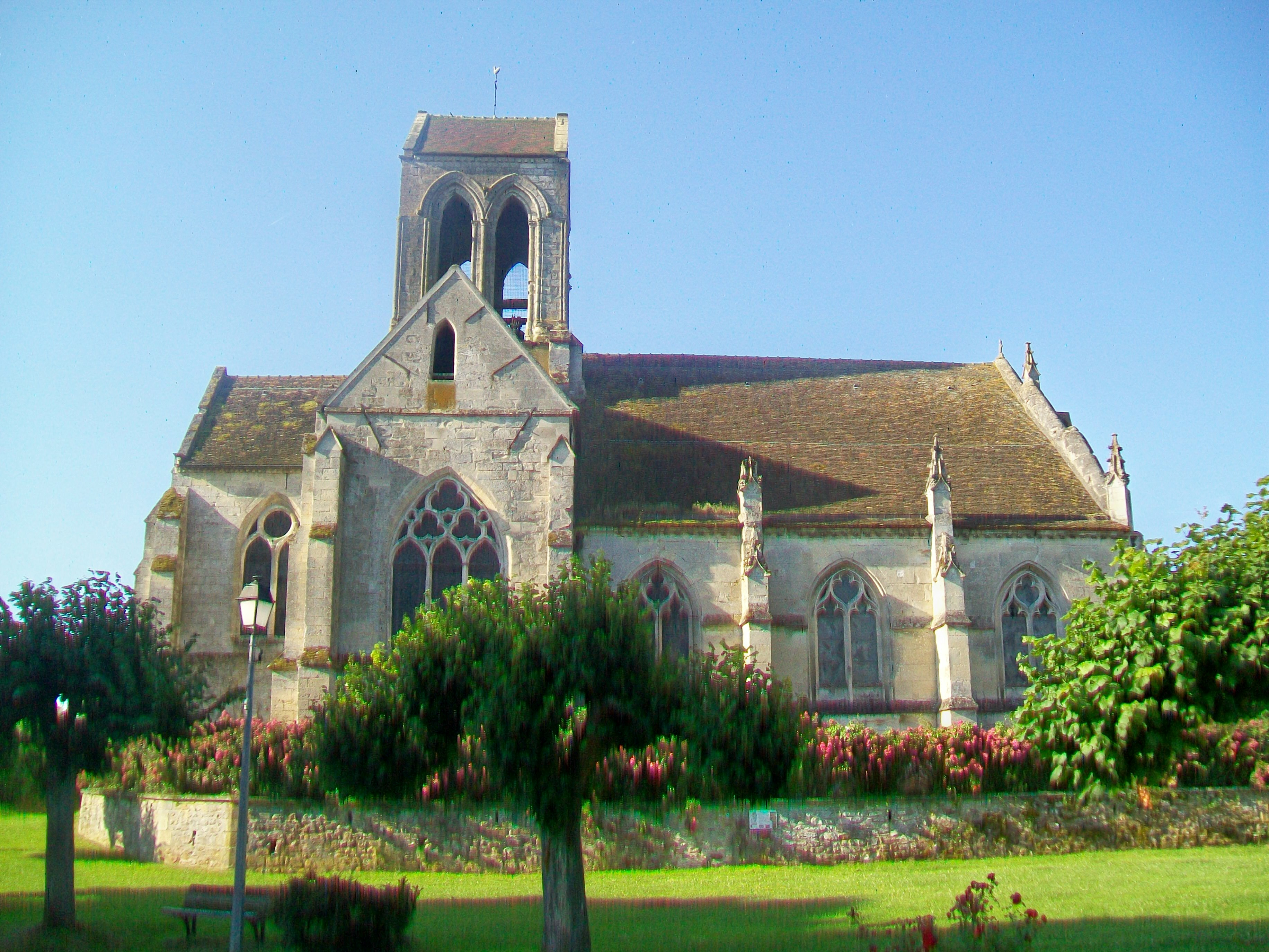 Vue de l'église depuis le sud.